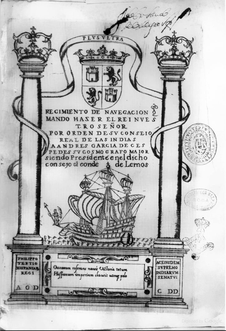 Frontiscipio del libro Regimiento de Navegación de Andrés García de Céspedes, publicado en 1606.